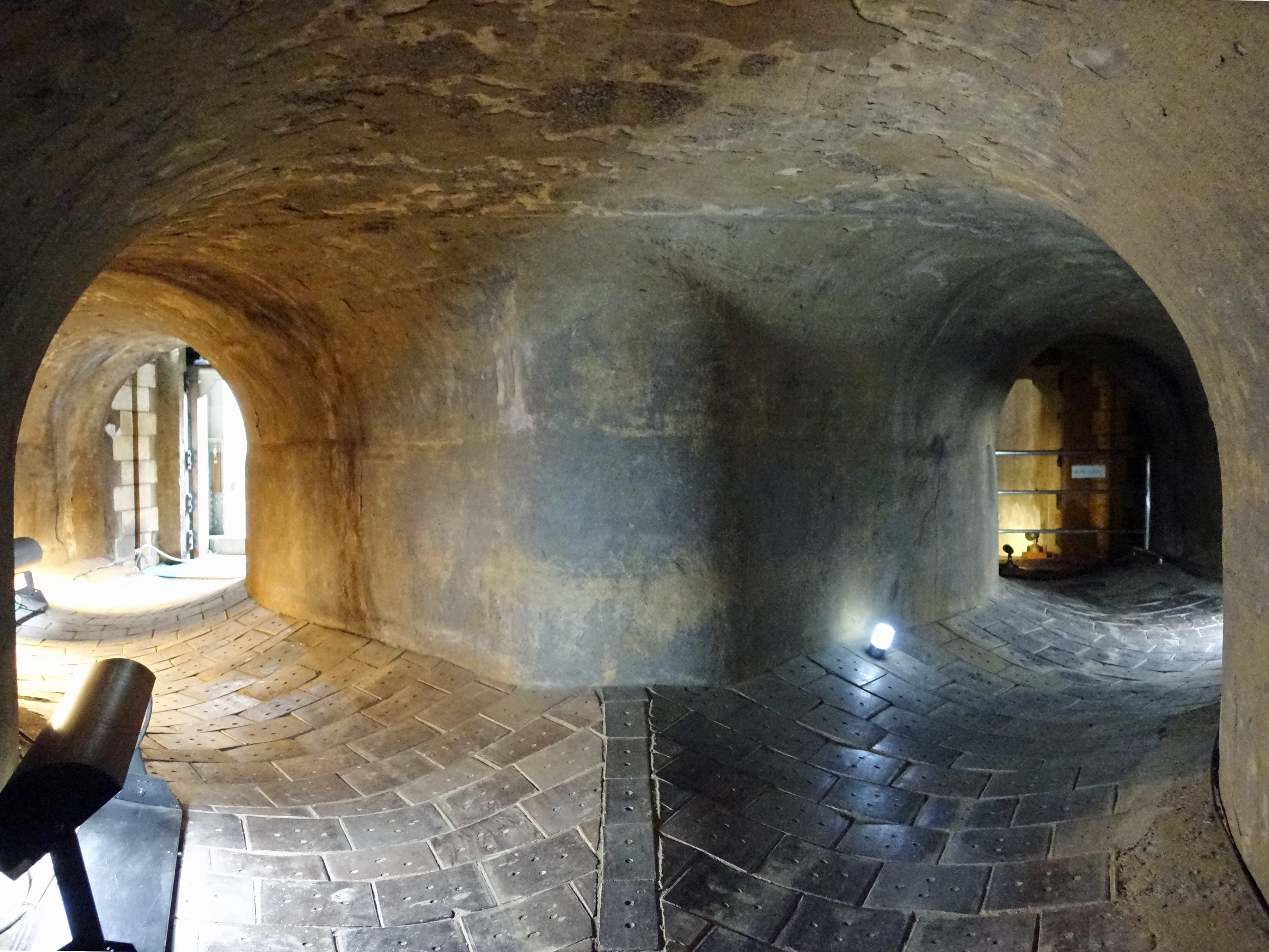 旧三河島汚水処分場喞筒場施設（2007年日本の重要文化財に指定）内部の下水管トンネル。